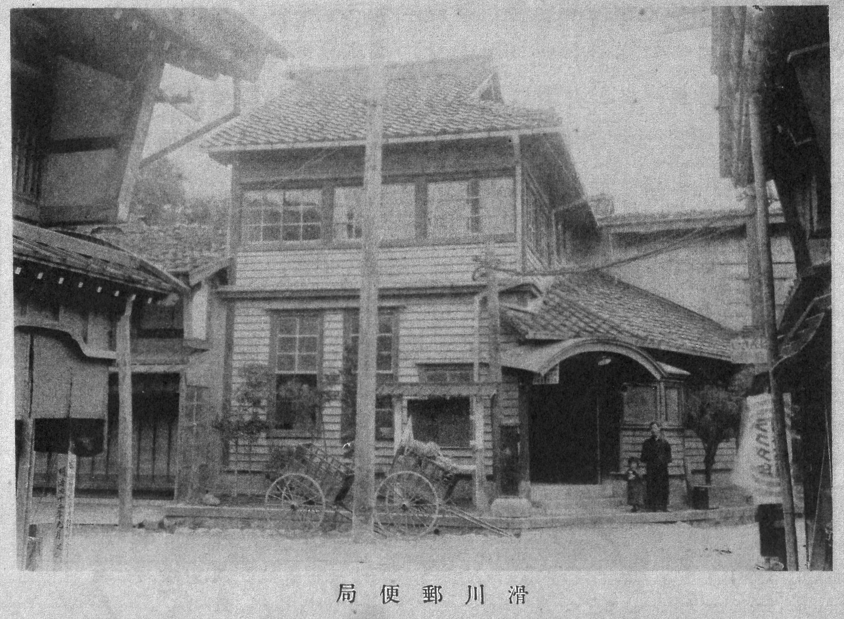 大正初年の滑川郵便局